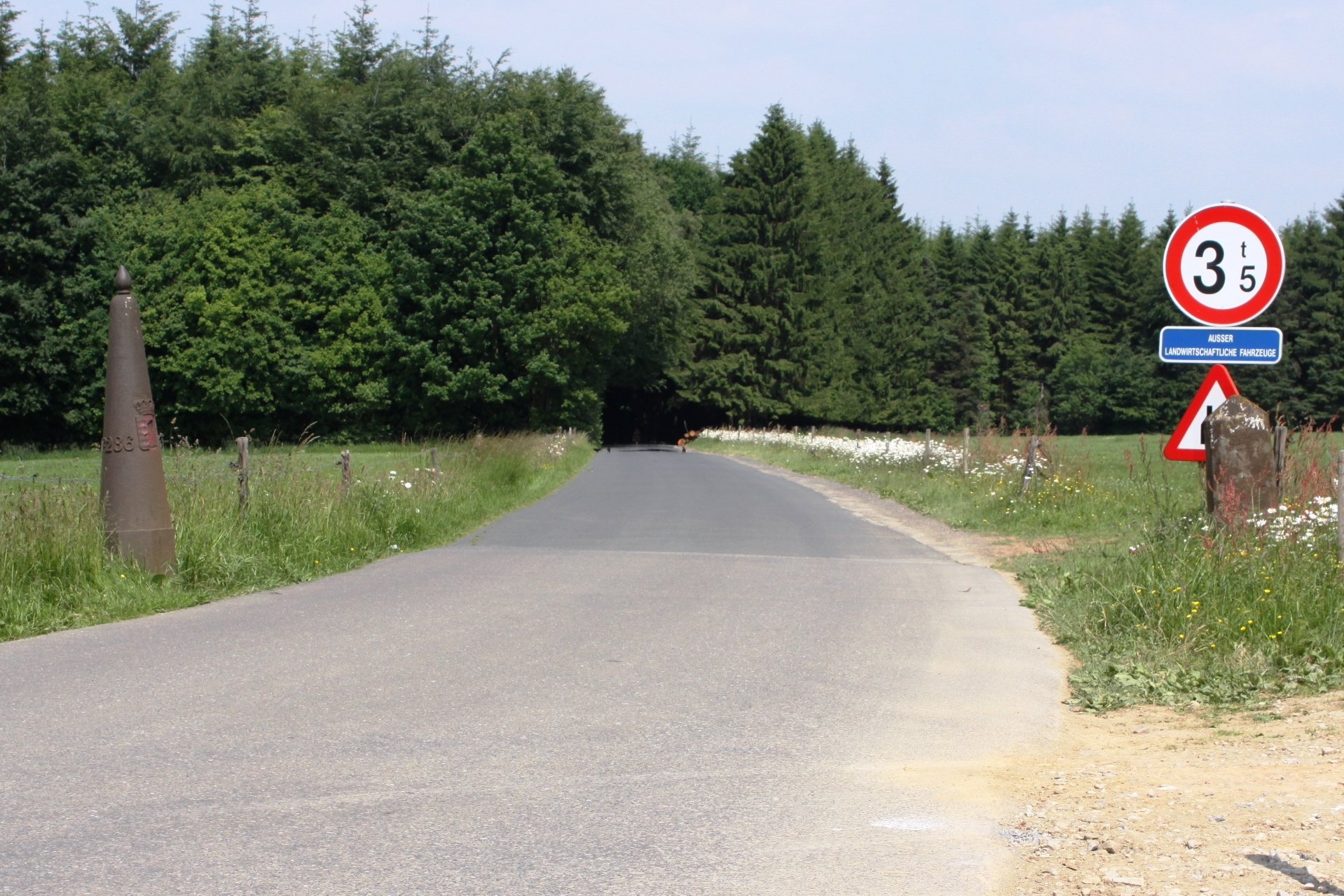 De fréiere belsch-lëtzebuergesch-däitschen Dräilännereck op der Schmëdd (1839-1919), haut.